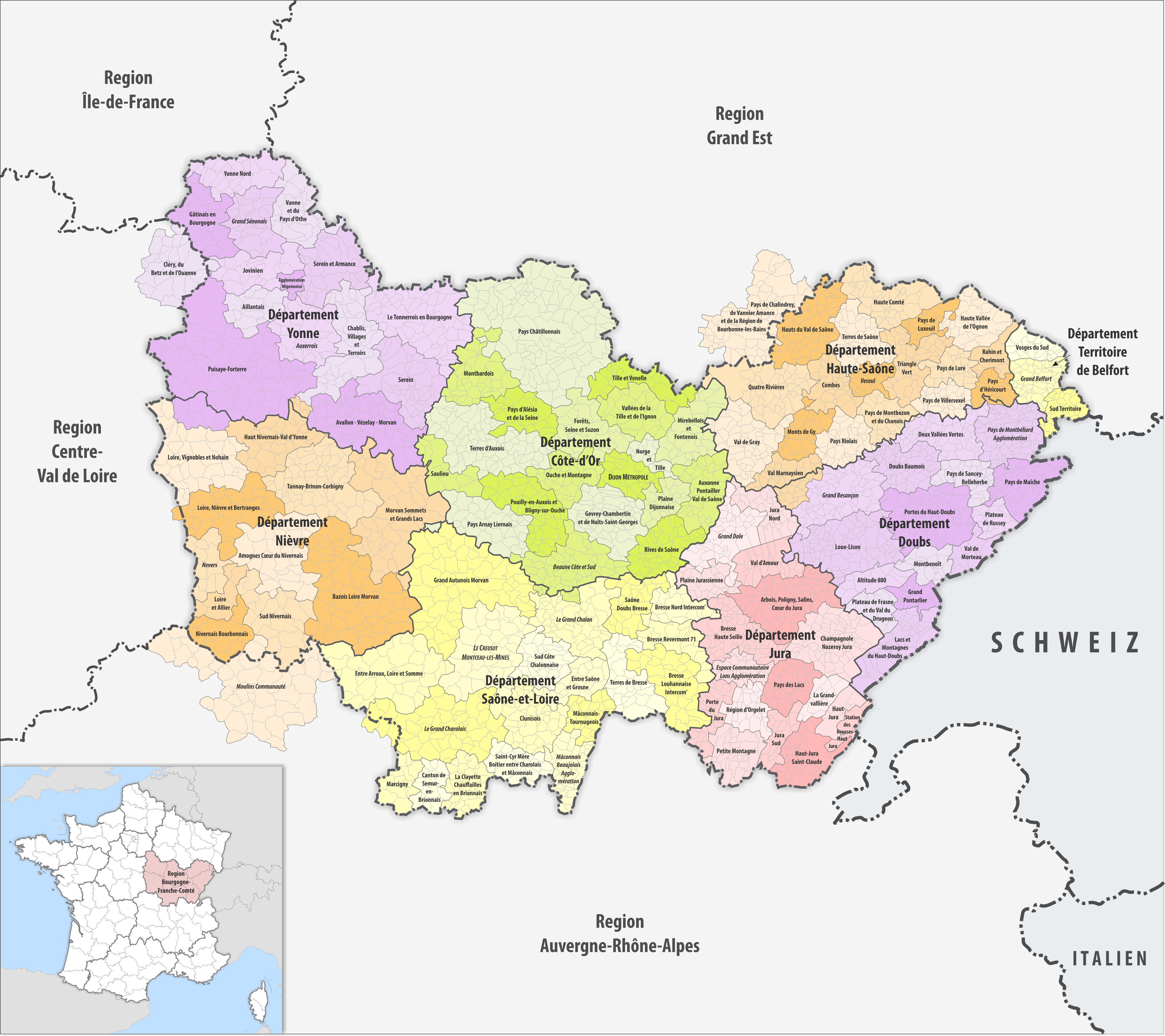 Gemeinden, Gemeindeverbände und Départemente in der Region Bourgogne-Franche-Comté